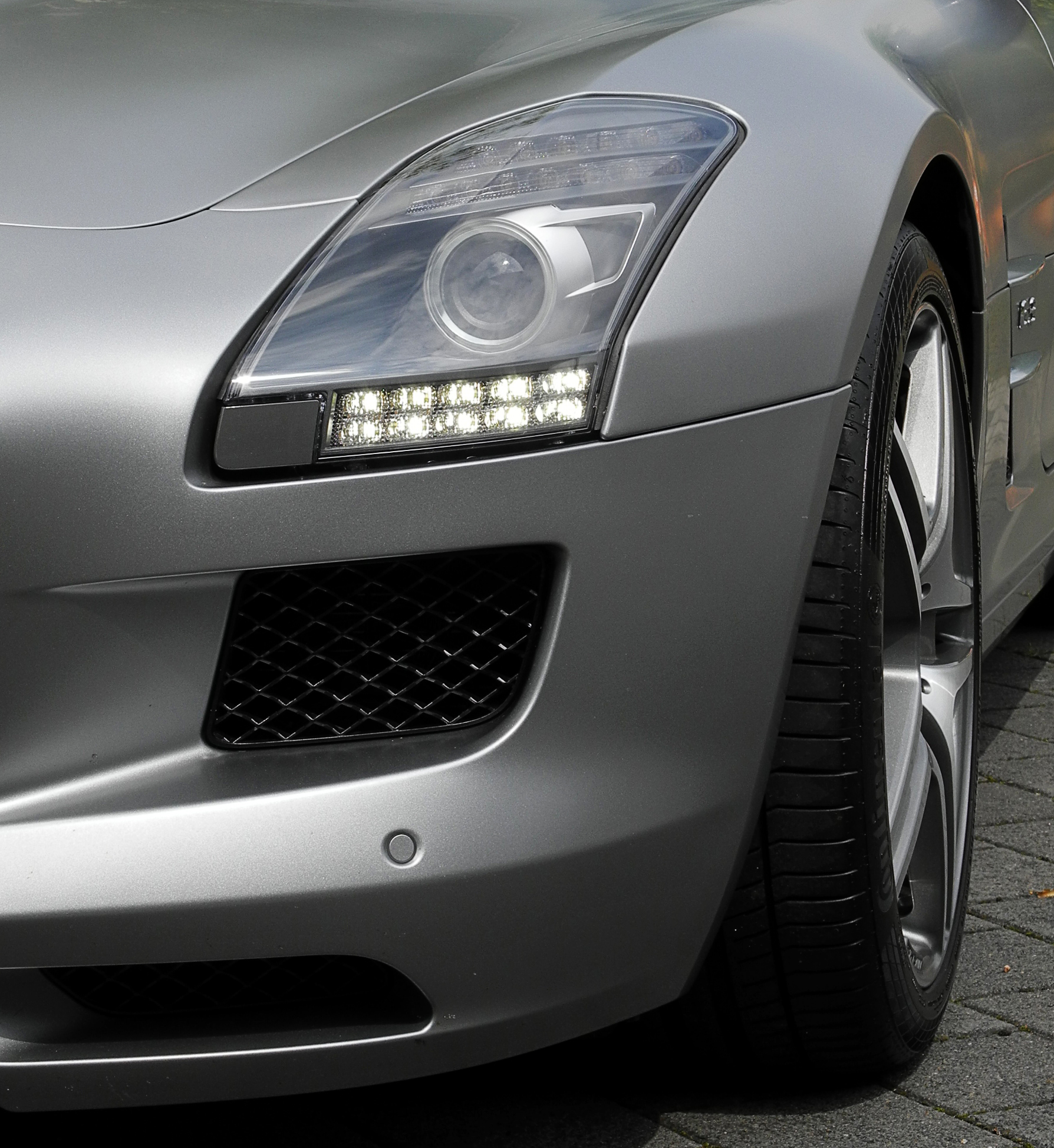 Mercedes-Benz SLS AMG (C 197)